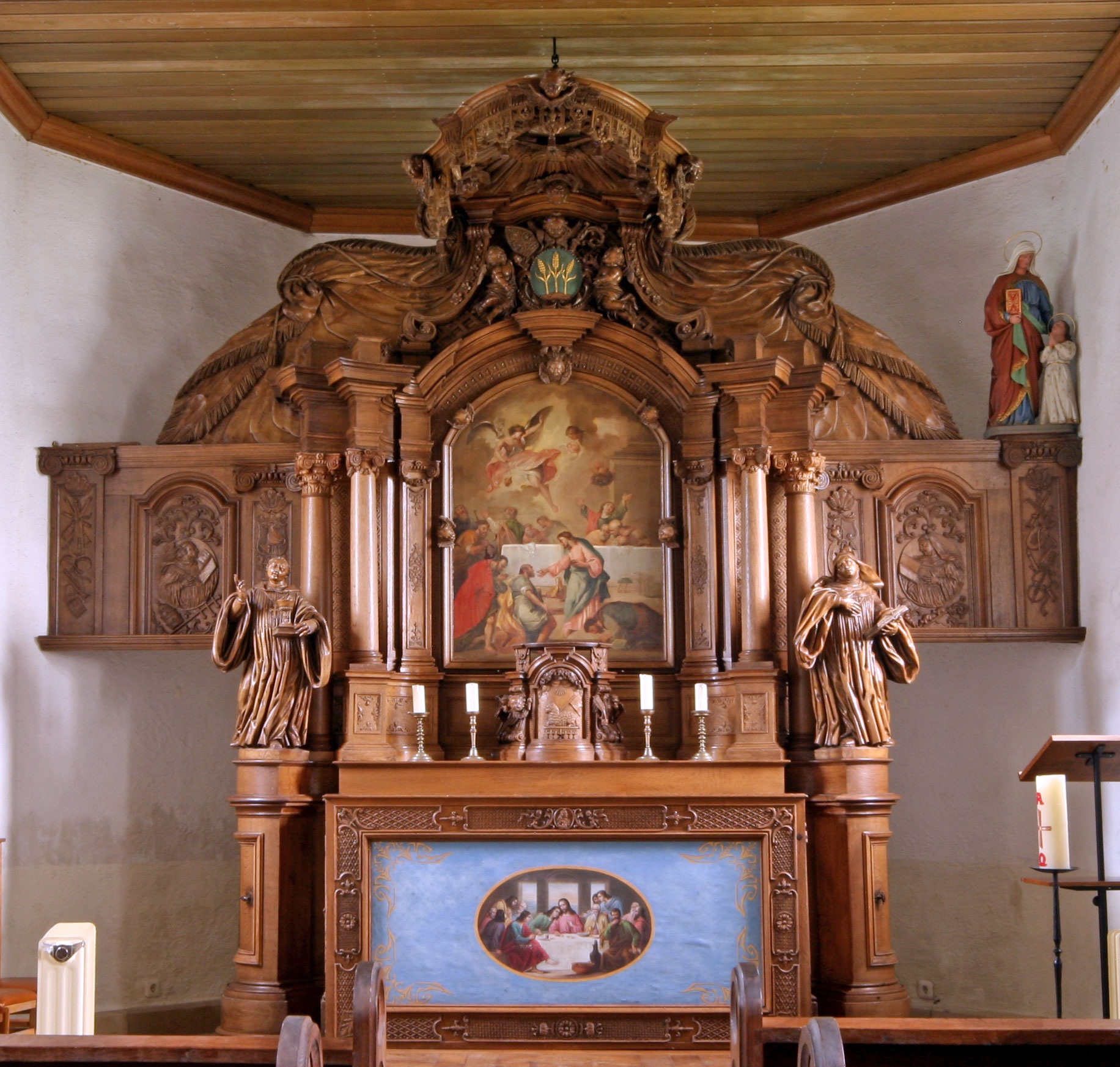 Sujet:Den Altor an der Kapweiler Kapell Source:Eege Foto vum User:Cornischong